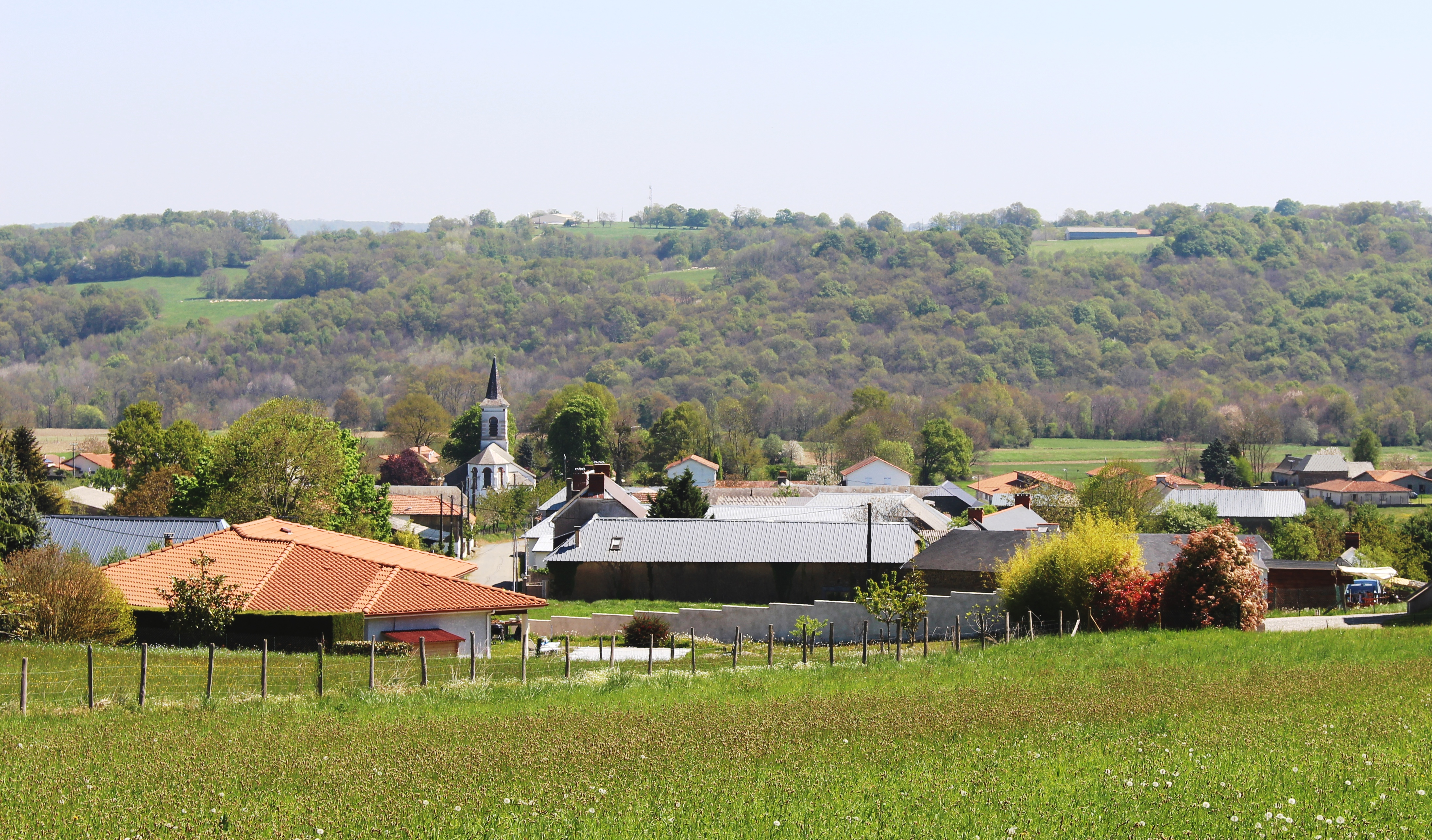 Mascaras (Hautes-Pyrénées)